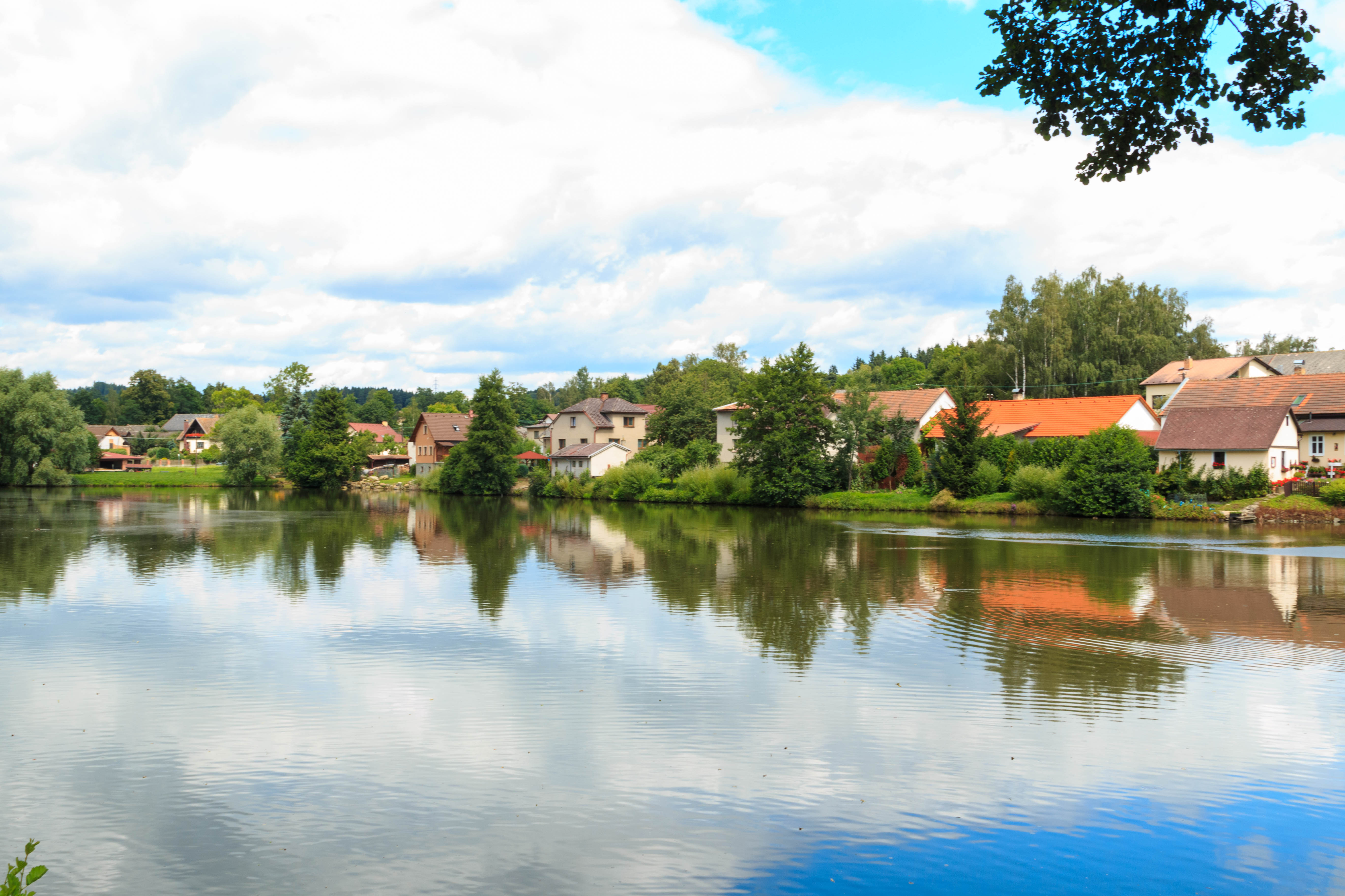 Knyk - rybník 01